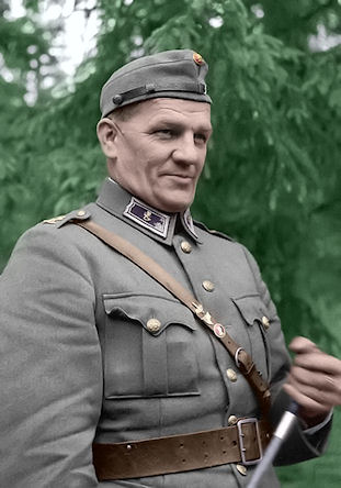 Jatkosodan 18. Divisioonan komentaja Aaro Pajari